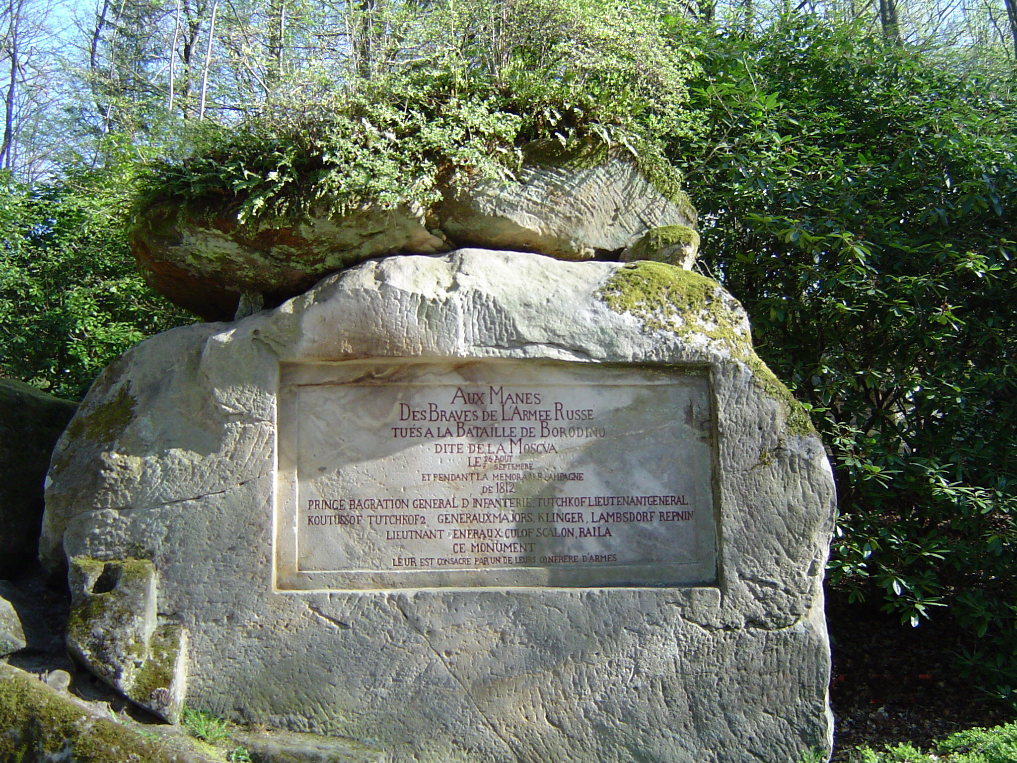 Donndorf - Fantaisie Schlosspark - Borodinostein. Diese Gedenktafel erinnert an Napoleons Feldzug 1812 nach Russland. Übersetzung: "Den Manen (gute Sterbegeister) der tapferen russischen Armee, gefallen in der Schlacht von Borodino, genannt an der Moskwa am 27. August - 7. September und während des denkwürdigen Feldzuges von 1812. Prinz Bagrantion, General der Infanterie, Tutchof Generalleutnant, Koutussof, Tutchof 2, Generalmajor Klinger, Lamsdorf. Dieses Denkmal ist ihnen gewidmet von einem ihrer Waffenbrüder".